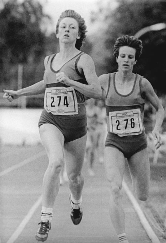 Christine Wachtel, Sigrun Wodars ADN-ZB Kluge 4.6.88 Jena: Leichtathletik-Olympiaqualifikation- Die 800 m der Frauen gewann Christine Wachtel (l.) (SC Neubrandenburg) am 3.6. mit der Weltjahresbestleistung von 1:57,09 min vor ihrer Klubkameradin Siegrun Wodars.